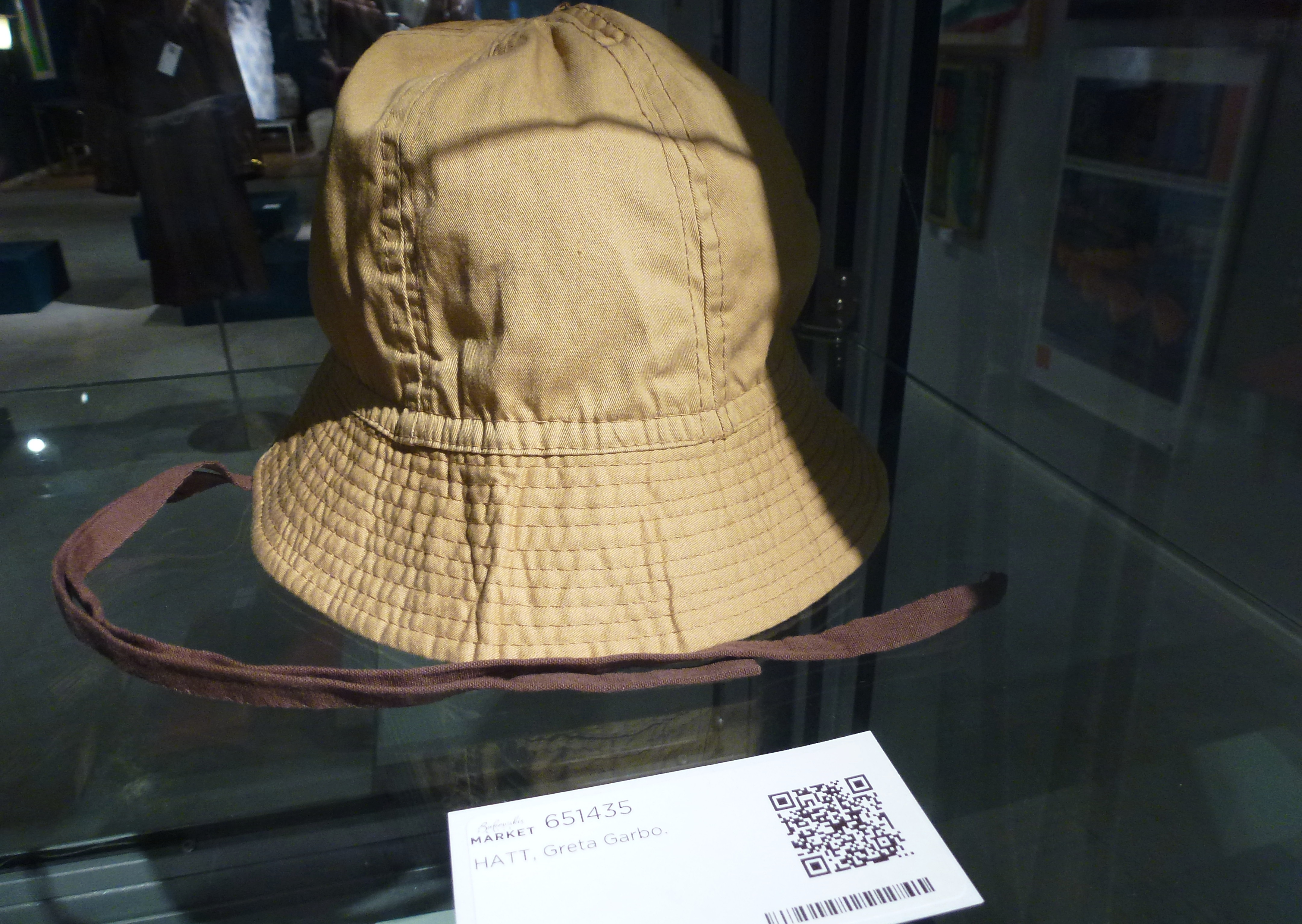 Greta Garbos hatt på Bukowskis auktion 2015